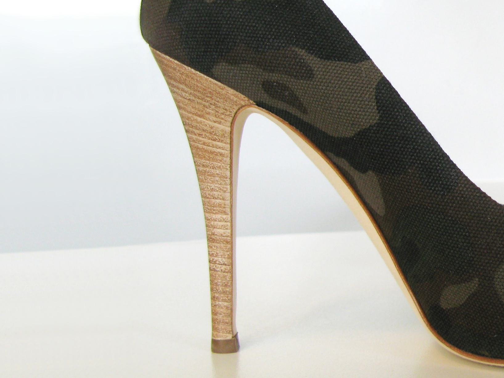 escarpin de marque Guiseppe Zanotti, détail du talon